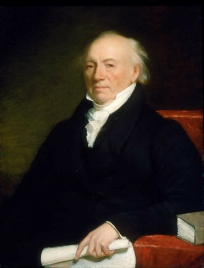 Portrait des US-amerikanischen Politikers und Vizegouverneurs des Bundesstaates Massachusetts Edward Hutchinson Robbins (1758-1829).